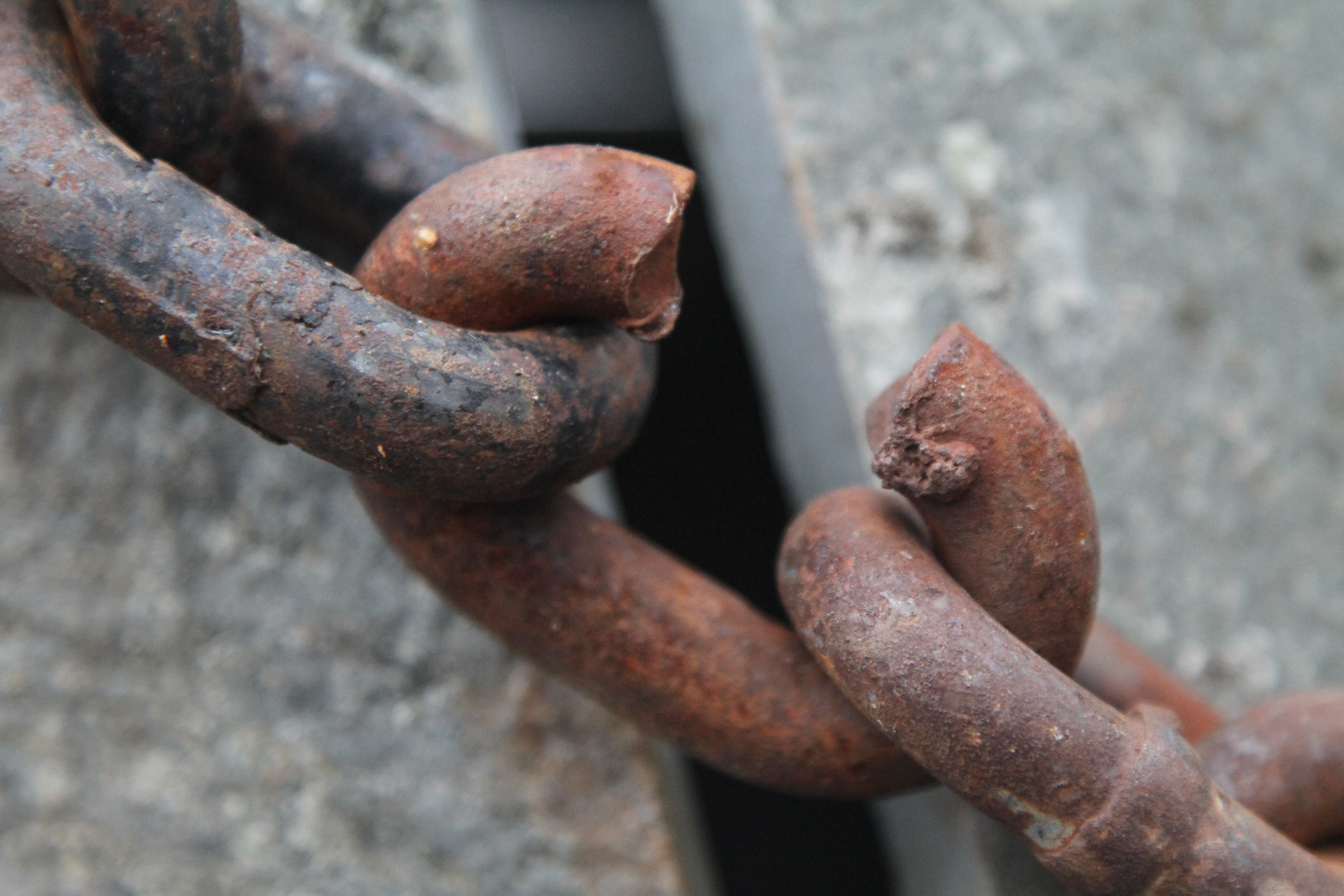 En av länkarna från Nollpunkten i Stilla som blev avklippt av poilisen. På Elvereddernes skiferbauta i Gargia.